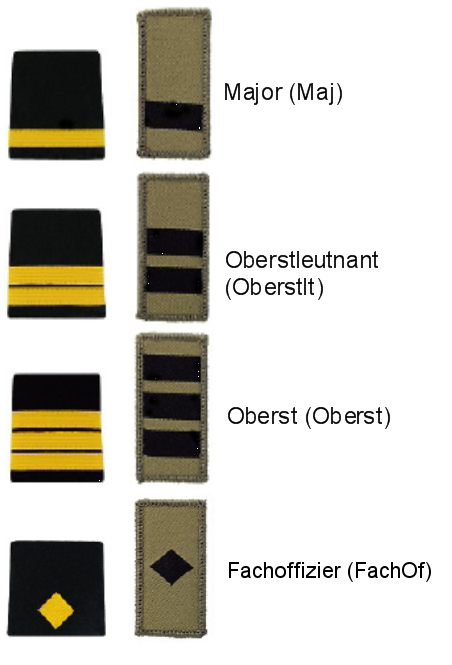 Schweizer Armee - Gradabzeichen Stabsoffiziere